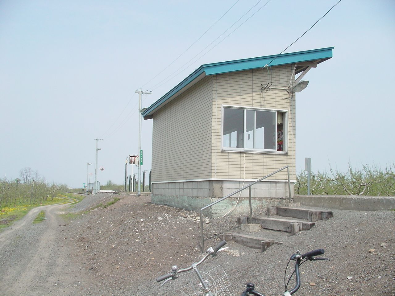 （林崎駅）